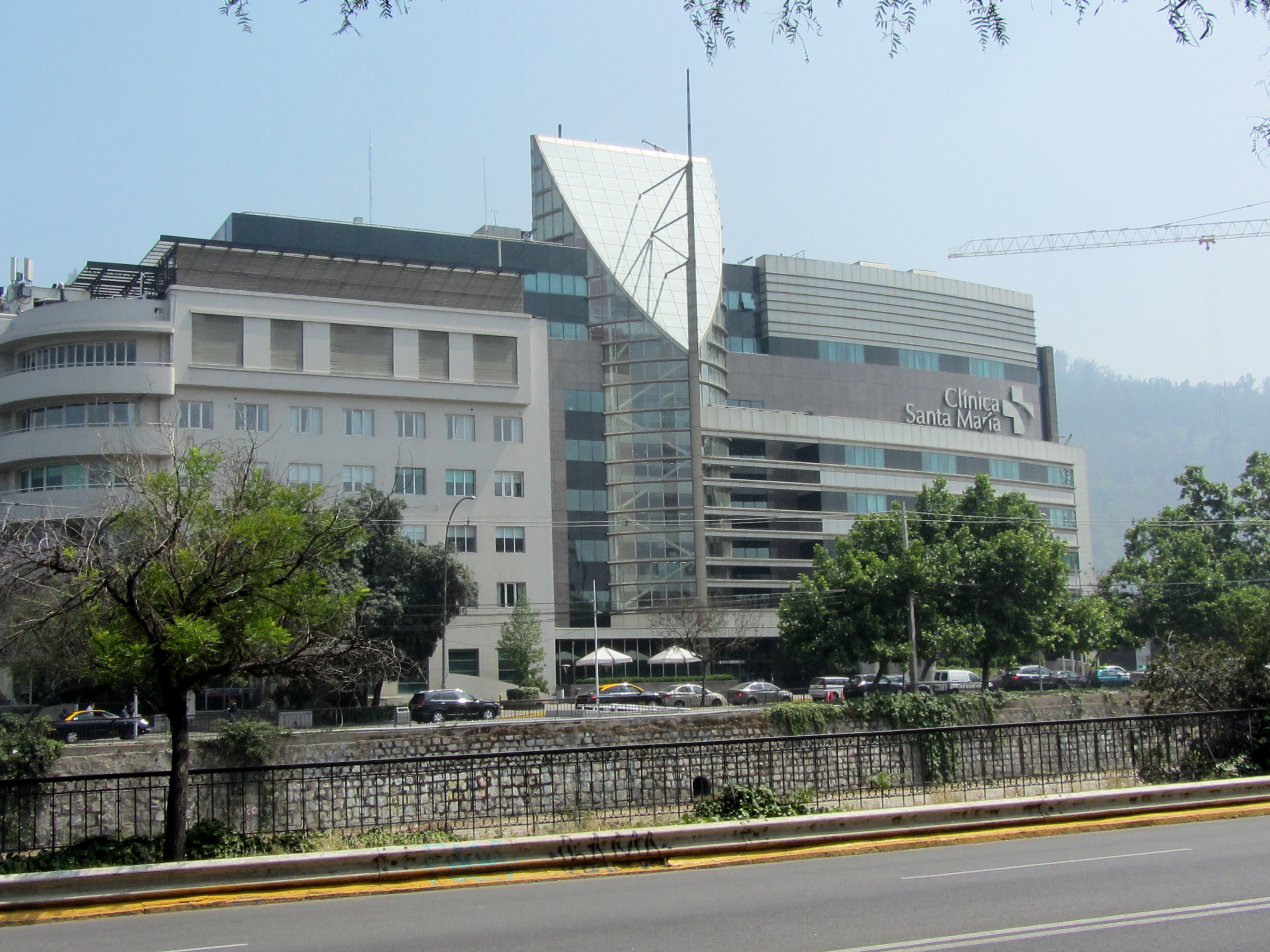 Clínica Santa María, viejo y nuevo edificio en avenida Santa María 410, Providencia, Santiago de Chile